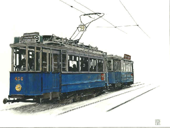 Met toestemming van eigenaar en maker: Jos Wiersema 11 sep 2006 23:47 (CEST) zie ook Categorie:Afbeelding tram